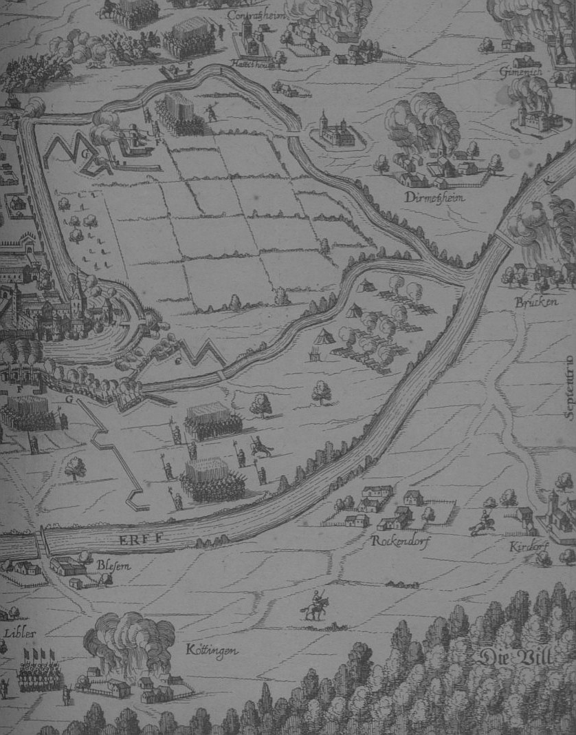 Kierdorf um 1642. Ausschnitt aus einer Ansicht der belagerten Stadt Lechenich und der Umgebung auf einem zeitgenössischen Flugblatt.